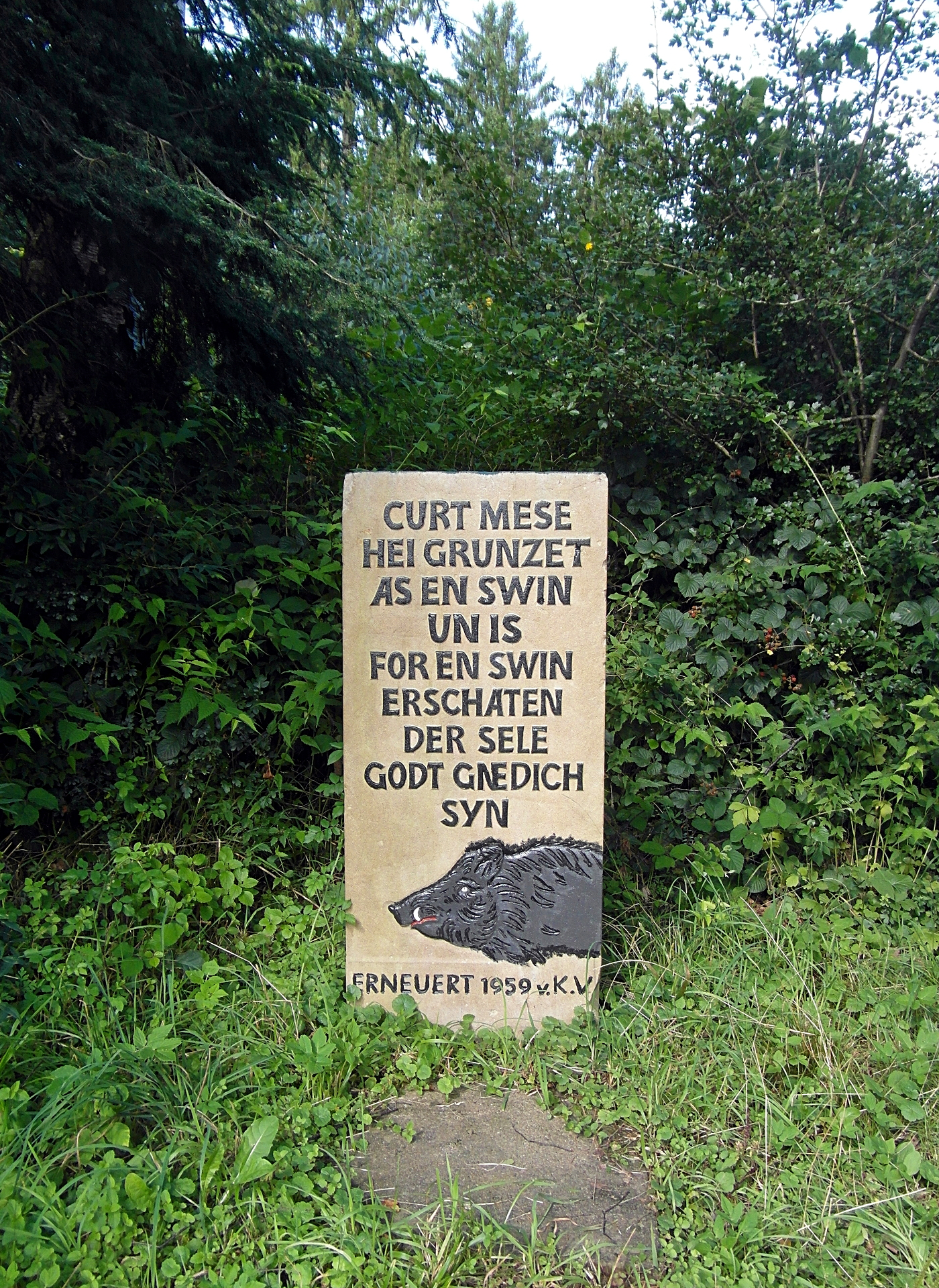 Der 1959 vom Kur- und Verkehrsverein aufgestellte neue Mesenstein am Panoramaweg am Deisterrand bei Bad Münder.